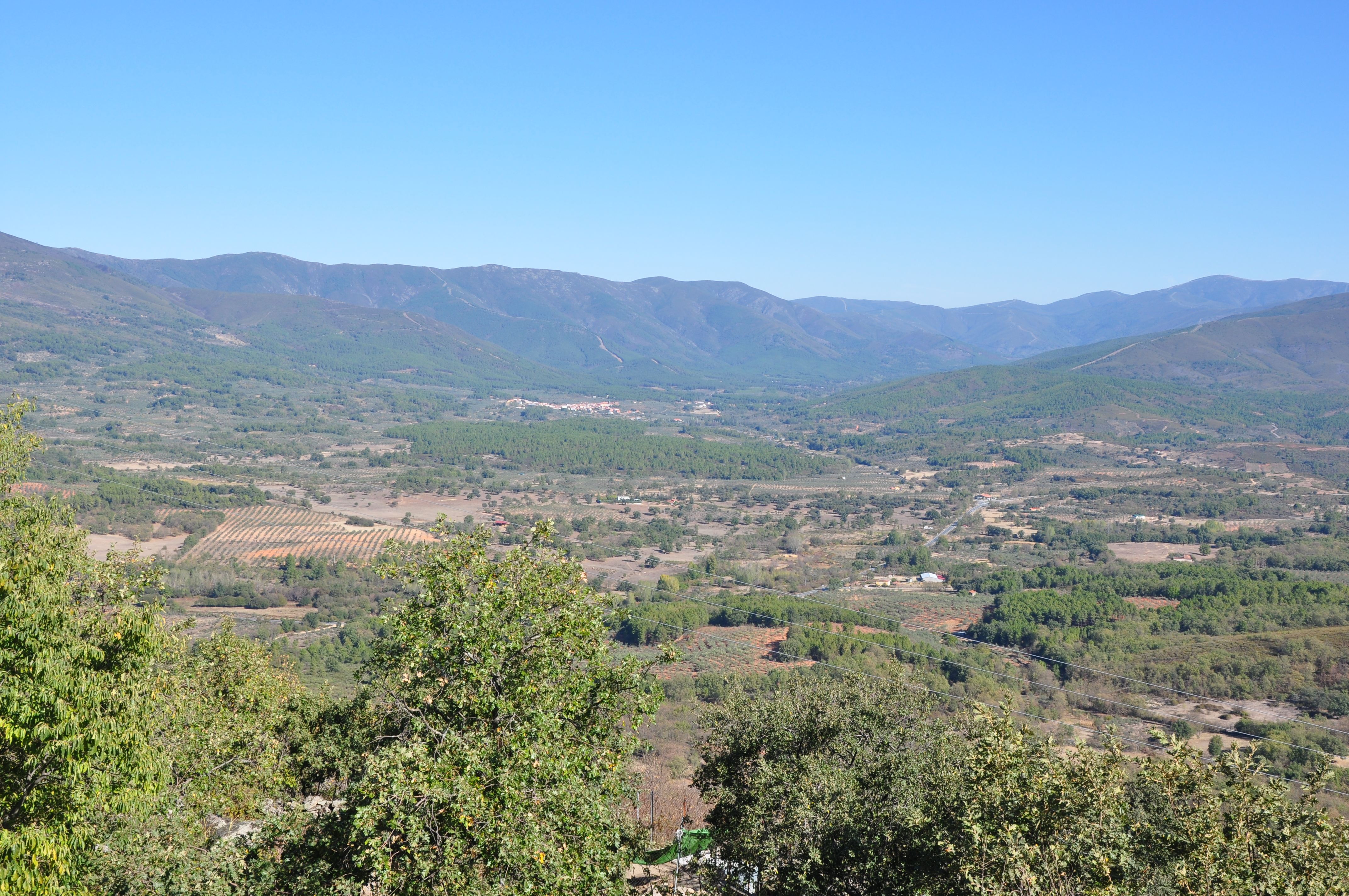 Sierra de Gata This is a photography of a Special Area of Conservation in Spain with the ID: ES4320037. Natura2000 entry, EEA entry